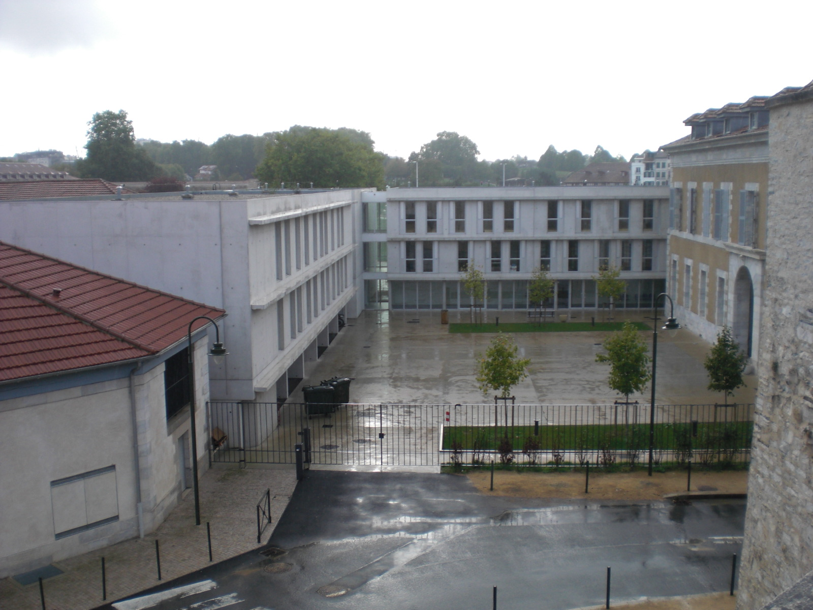 Errobiko campus berriko eraikinak. Baionako Institutu Unibertsitario Teknologikoa.